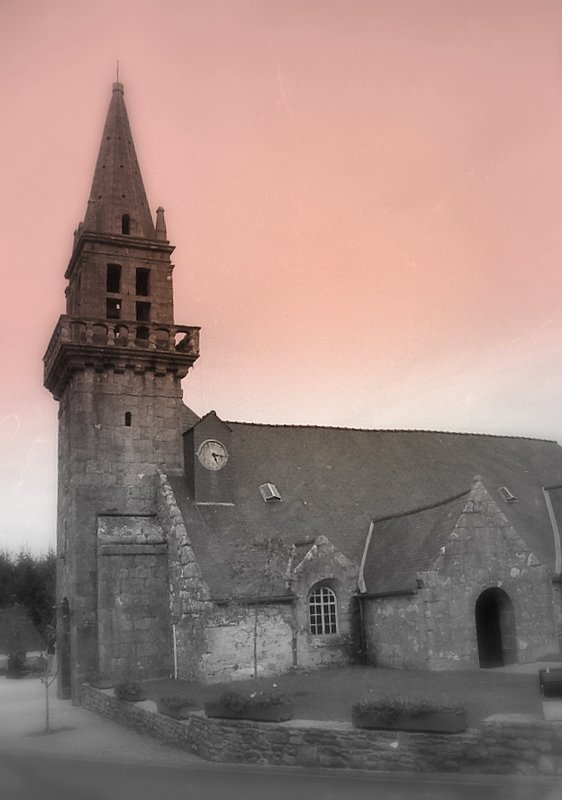 Église Cloître St Thegonnec, denez goasguen